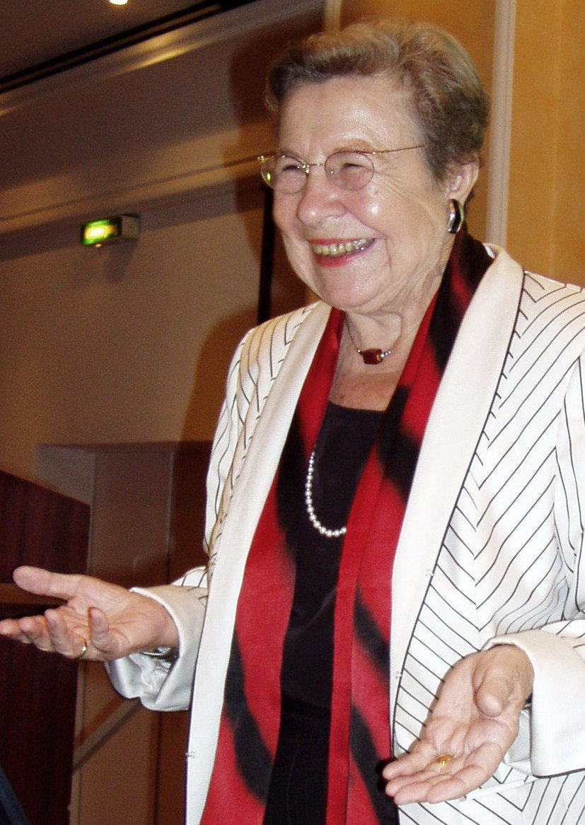 Prof. Dr. Ursula Lehr (* 1930), ehemals deutsche Bundesministerin und führende Wissenschaftlerin auf dem Gebiet der Alternsforschung, bei einem Vortrag in Bad Kissingen